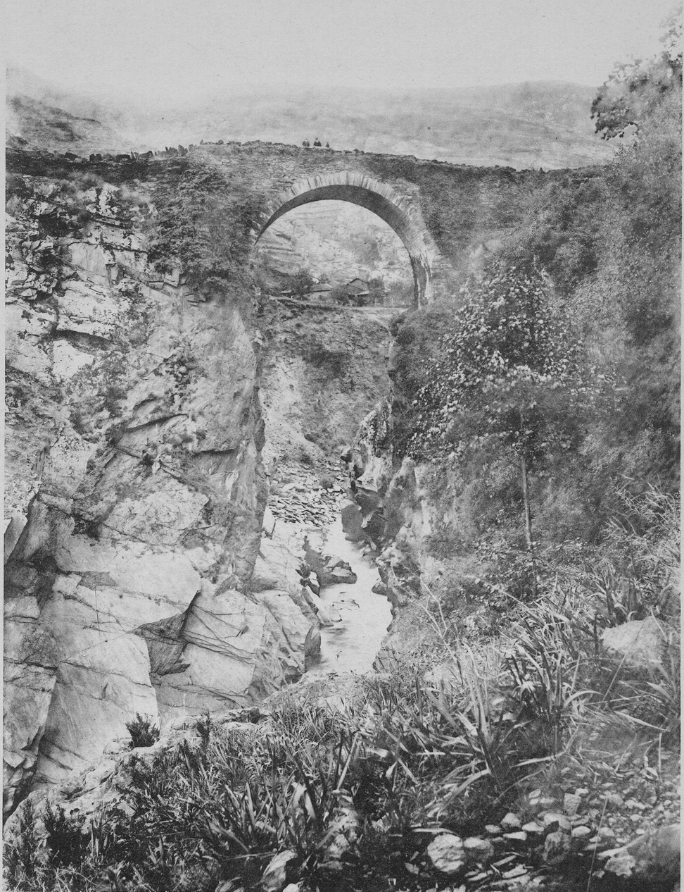 Puente de Salime a finales del siglo XIX